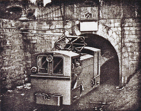 Minenlokomotive AEG U28 aus dem Jahr 1904 beim Verlassen eines 1894 gebauten Tunnels der Zeche "Aachener Hütten-Aktien Verein Rothe Erde" in Luxemburg